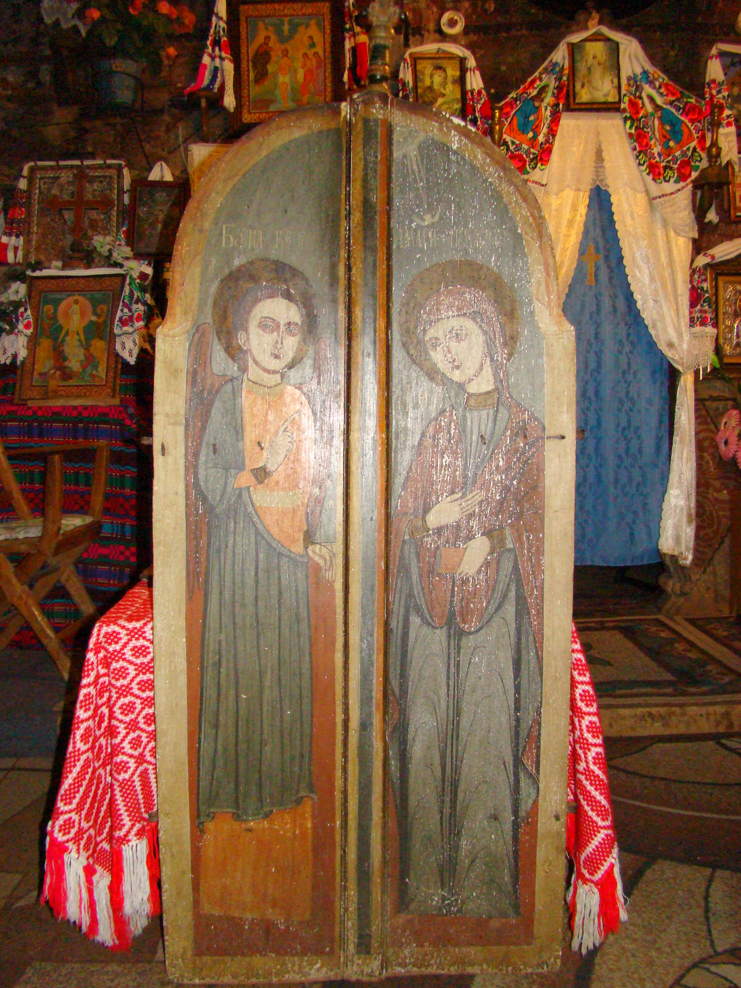 Biserica de lemn "Sf. Ioan Teologul", sat BRĂDET; comuna BUNTEŞTI